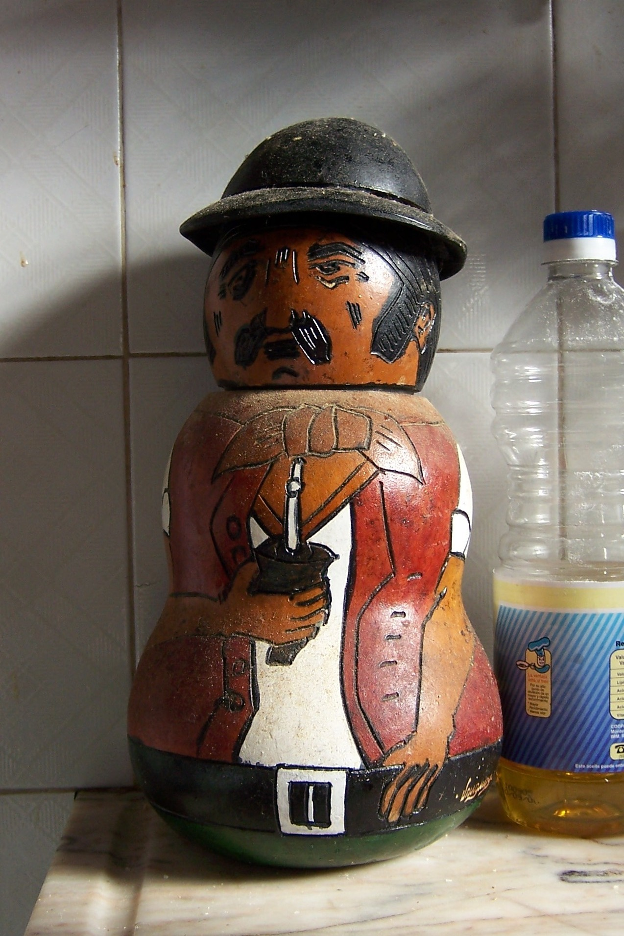 Envase para yerba mate, también denominado yerbera, construido en Piriápolis, Uruguay, con una calabaza.